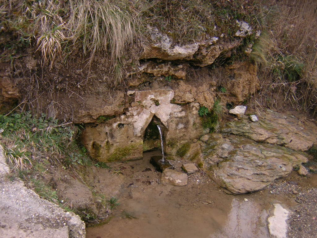 La Font del Cisco (Monistrol de Calders, Moianès)